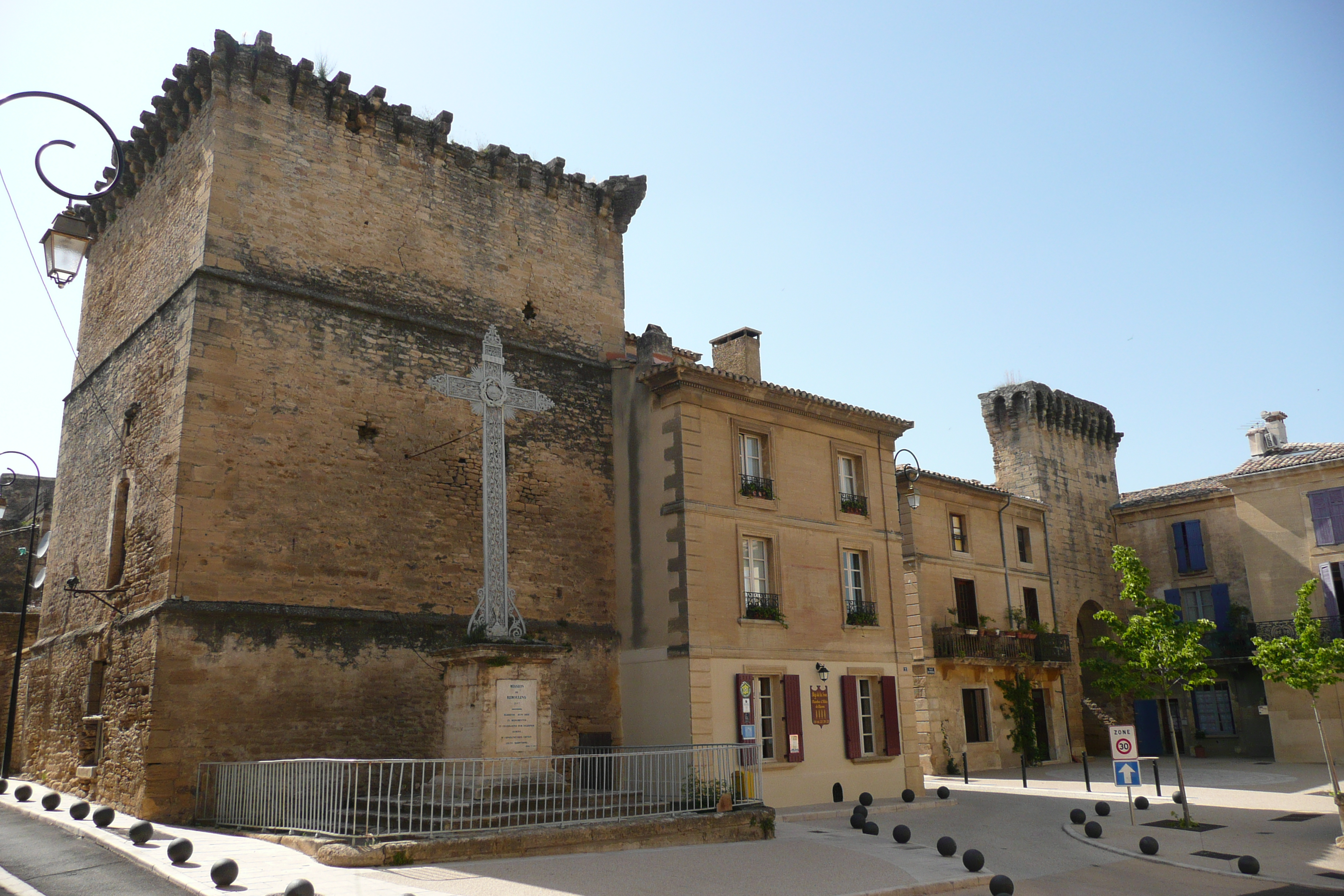 Rempart à Remoulins.